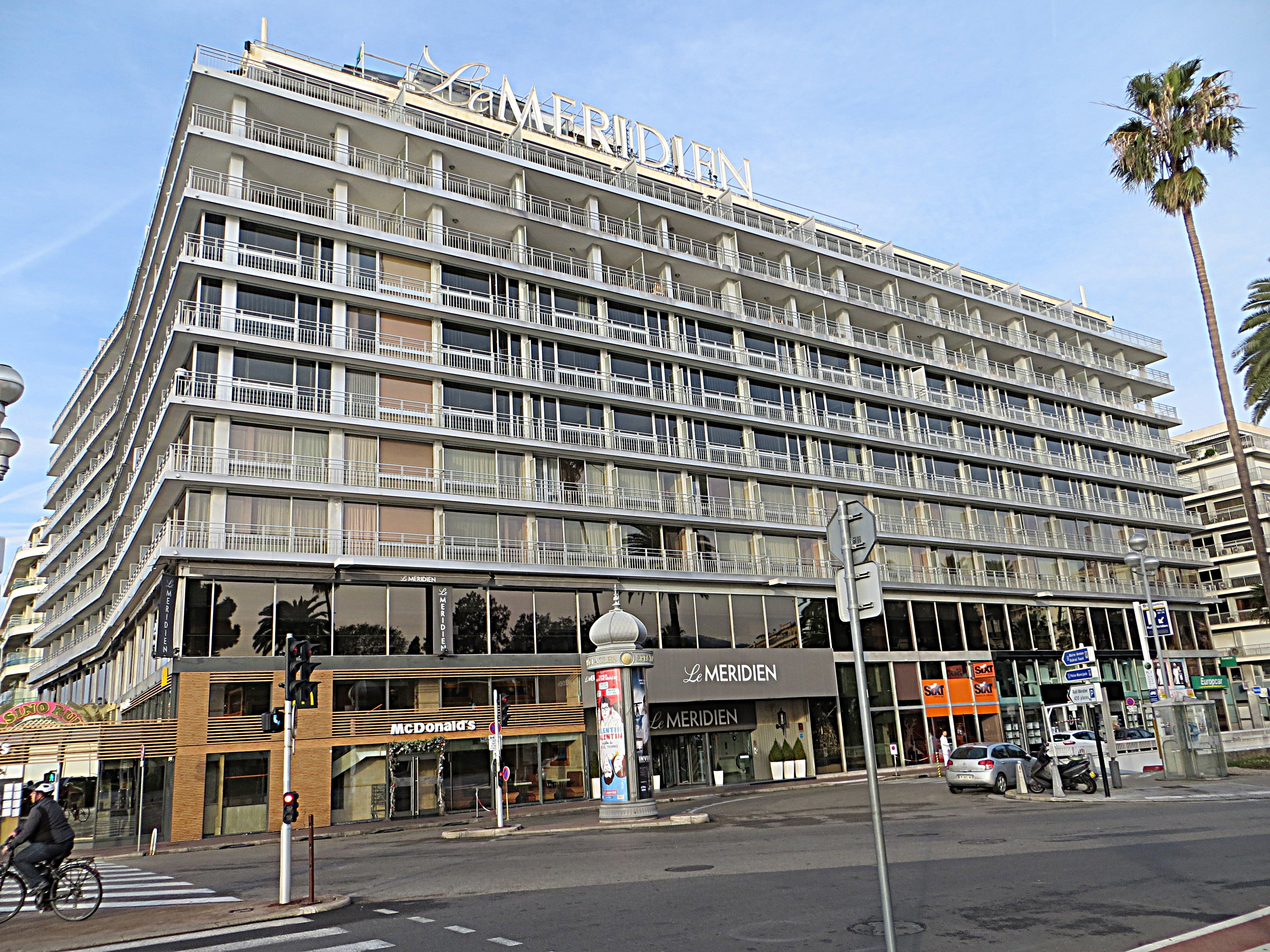 Le Meridien Hotel